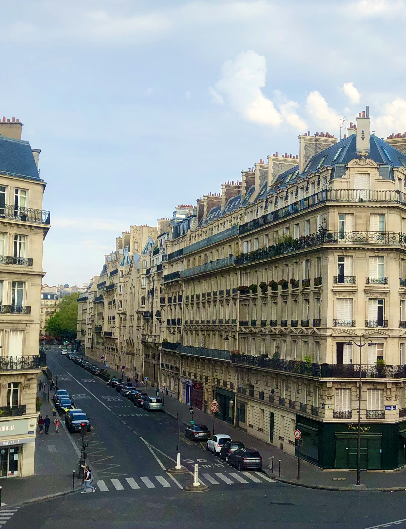 Rue Ampère Paris 17ème arrondissement , vue de la place d'Israël